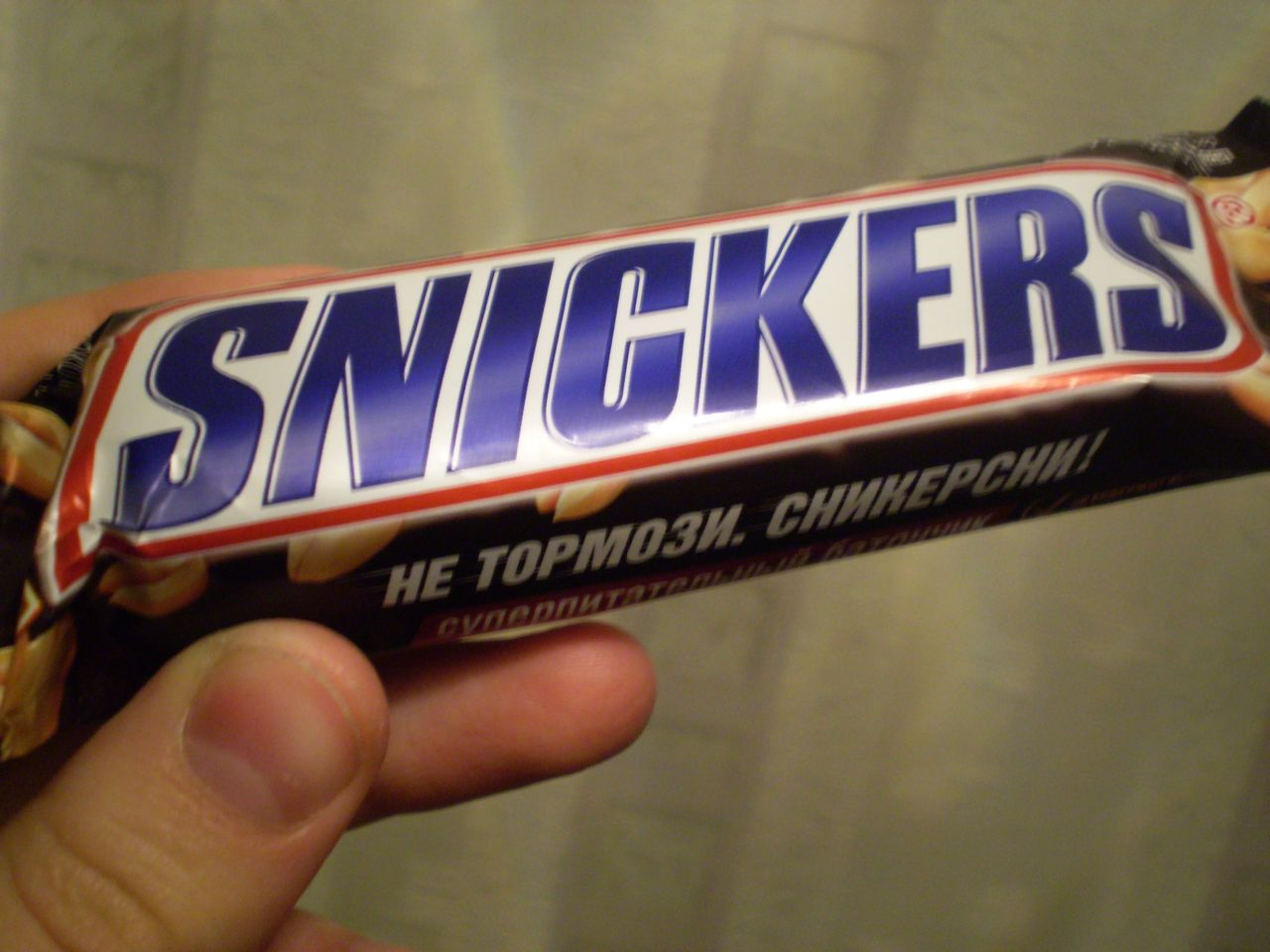 Стандартный батончик Snickers в обвёртке